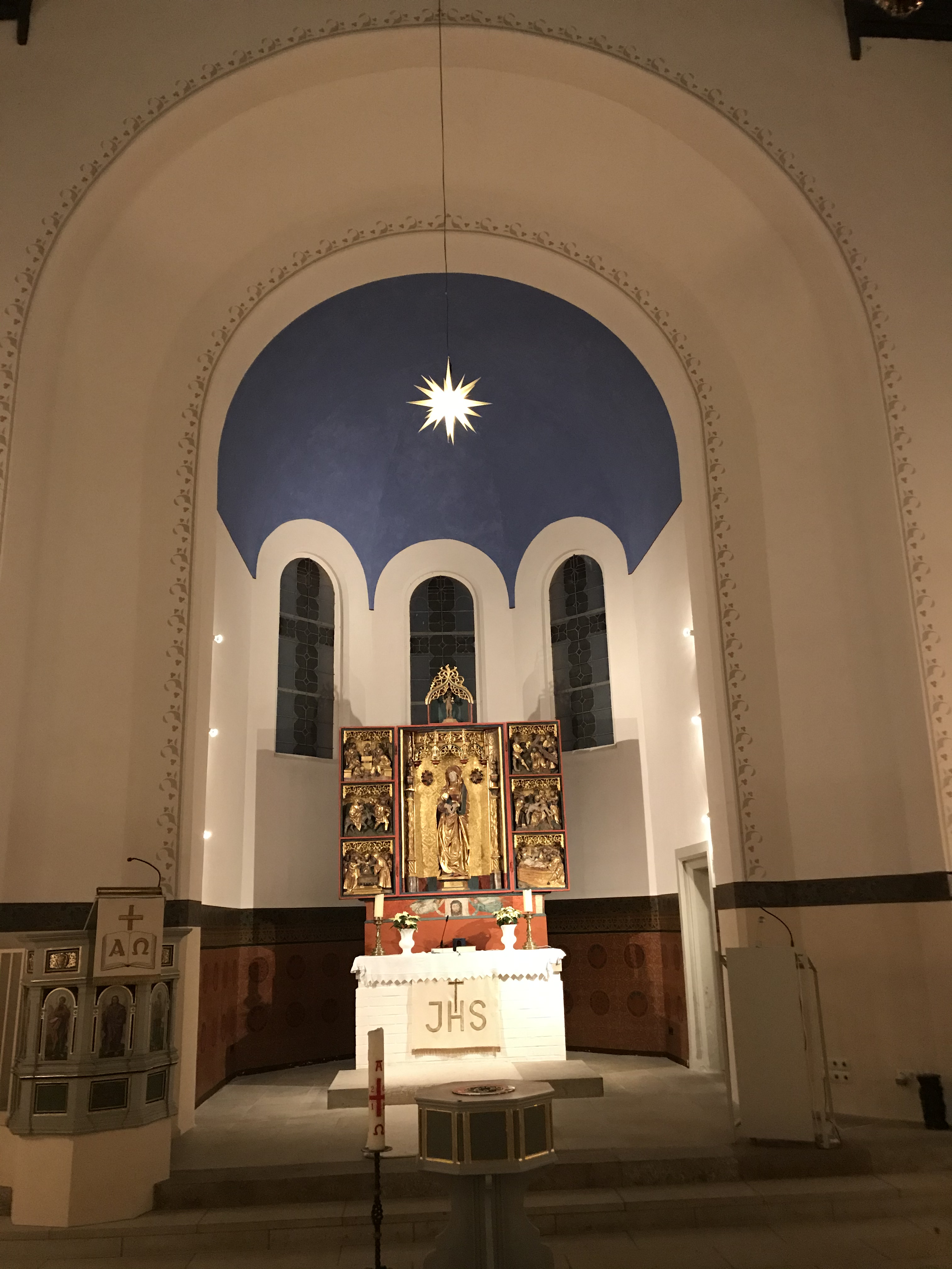 Breselenz, Kirche St. Martin, romanischer Rundbogen, welcher zum Chor führt.